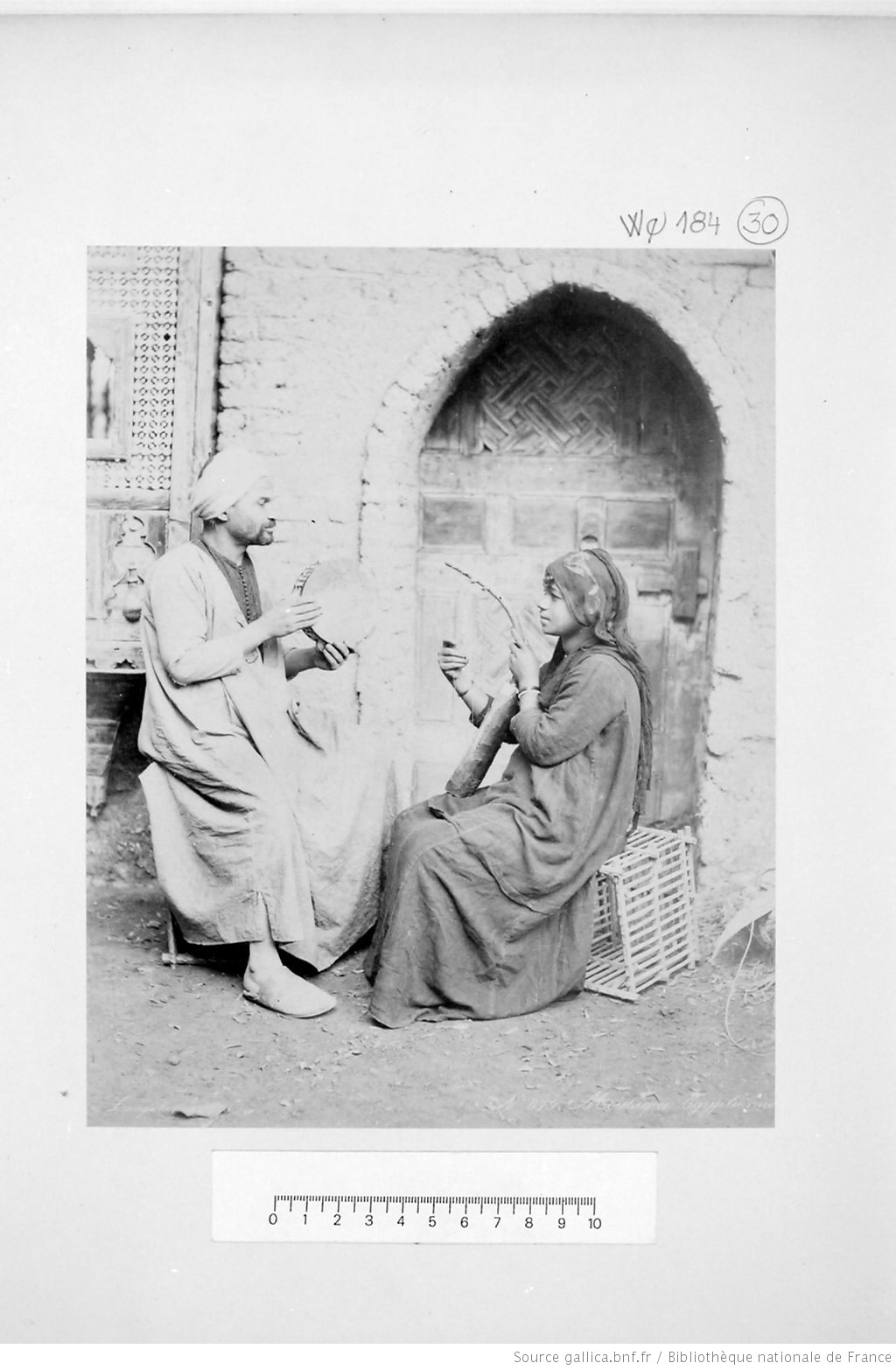 Musique égyptienne, Zangaki et H. Arnoux